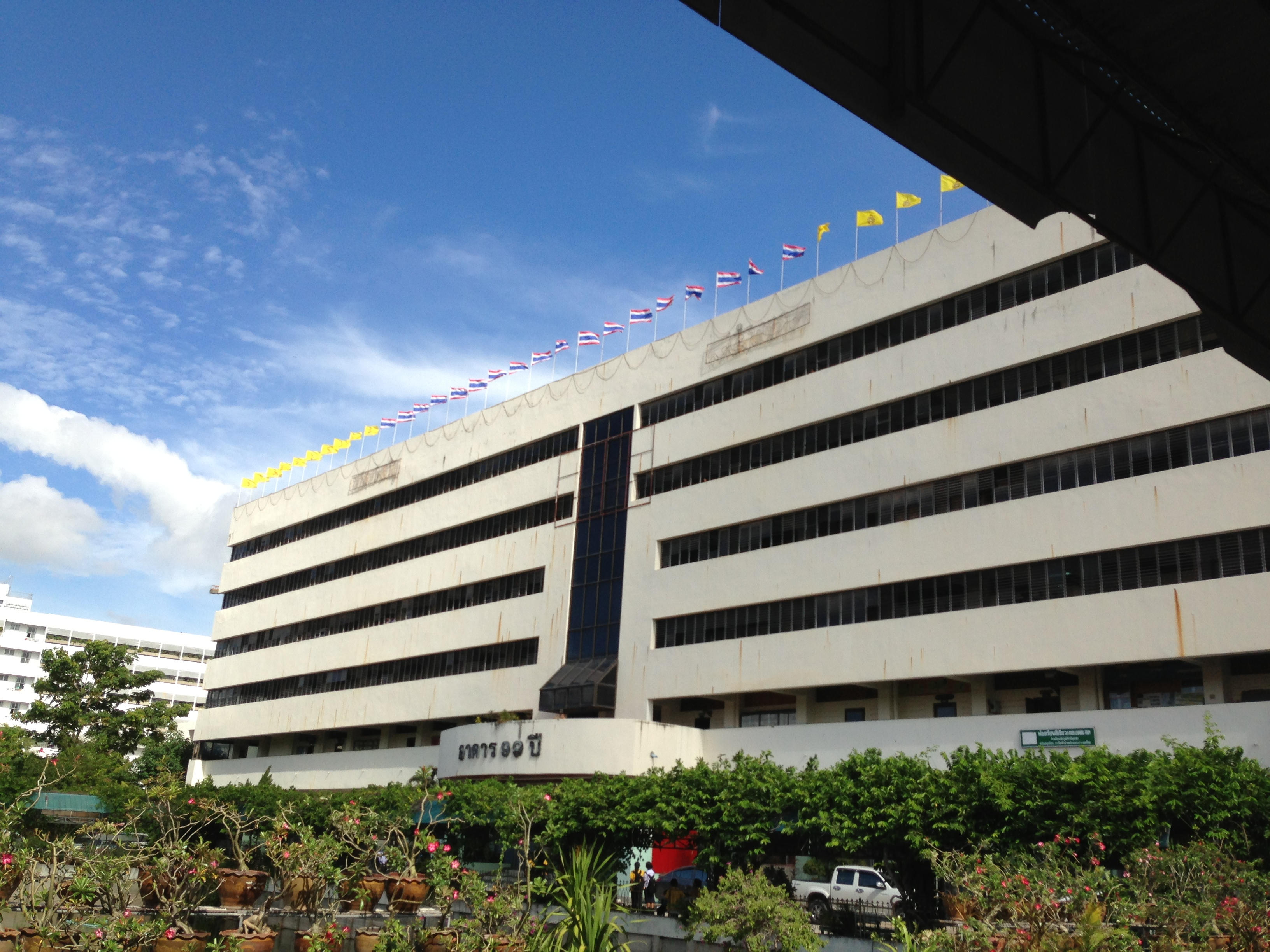 อาคาร 6 เป็นอาคารที่ใหญ่ที่สุดในโรงเรียนมีทั้งสิ้น 6 ชั้น ชั้นที่ 1 เป็นที่ตั้งของห้องประชุม 99 ปี ชั้นที่ 2 ใช้เป็นห้องเรียนและห้องปฏิบัติการทางวิทยาศาสตร์ และห้องเก็บสาร (สารเคมี) ชั้นที่ 3 คือห้องเรียนและห้องปฏิบัติการทางฟิสิกส์ ชีววิทยา ชั้นที่ 4 คือห้องเรียน ของหมวดวิทยาศาสตร์ ชั้นที่ 5 คือห้องเรียนและห้องพักครูของหมวดภาษาไทย ชั้นที่ 6 คือห้องเรียน ของหมวดวิชาภาษาไทย